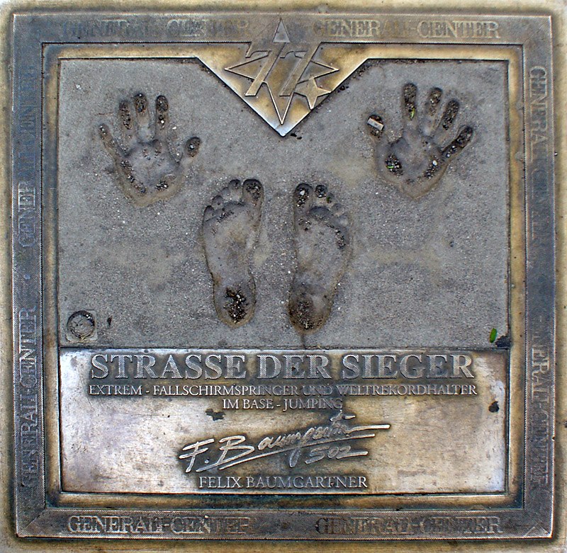 Ehrung für Felix Baumgartner auf der Straße der Sieger in der Mariahilfer Straße, Wien